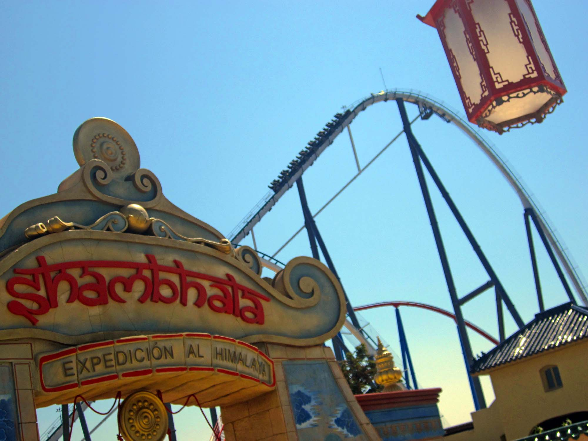 Aquesta es el pòrtic de l'entrada on s'encontra "Shambala: Expedición al Himalaya".